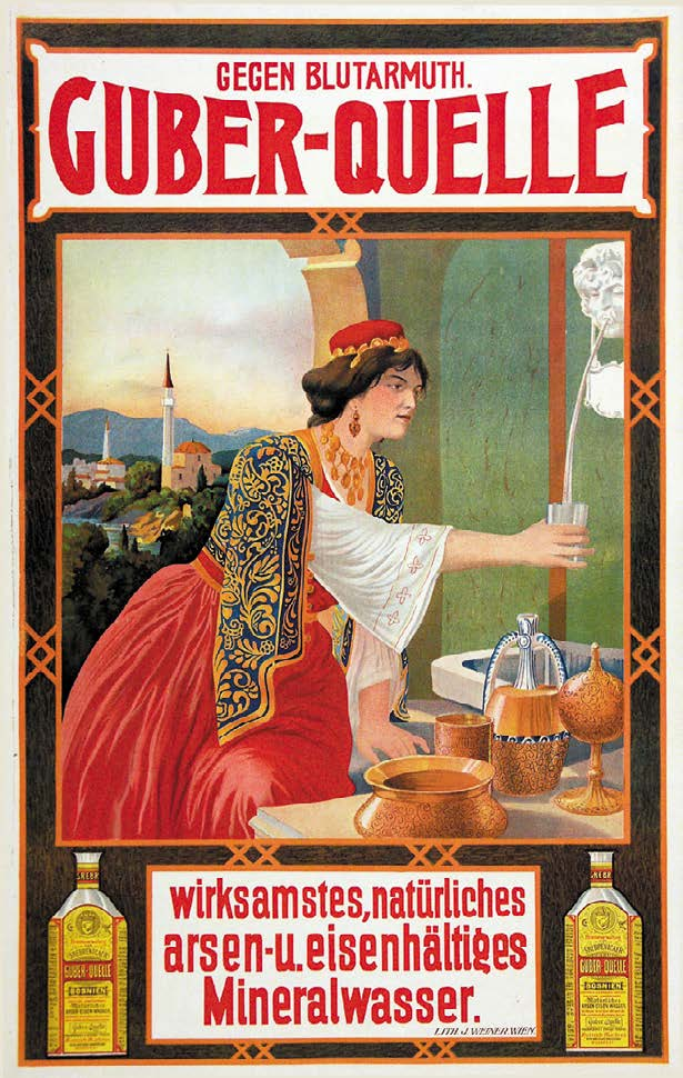 Werbeplakat Guber-Quelle von Mattoni. Farblithographie. 100 x 64 cm. Gegen Blutarmuth. Guber-Quelle wirksamstes, natürliches arsen- u. eisenhältiges Mineralwasser.